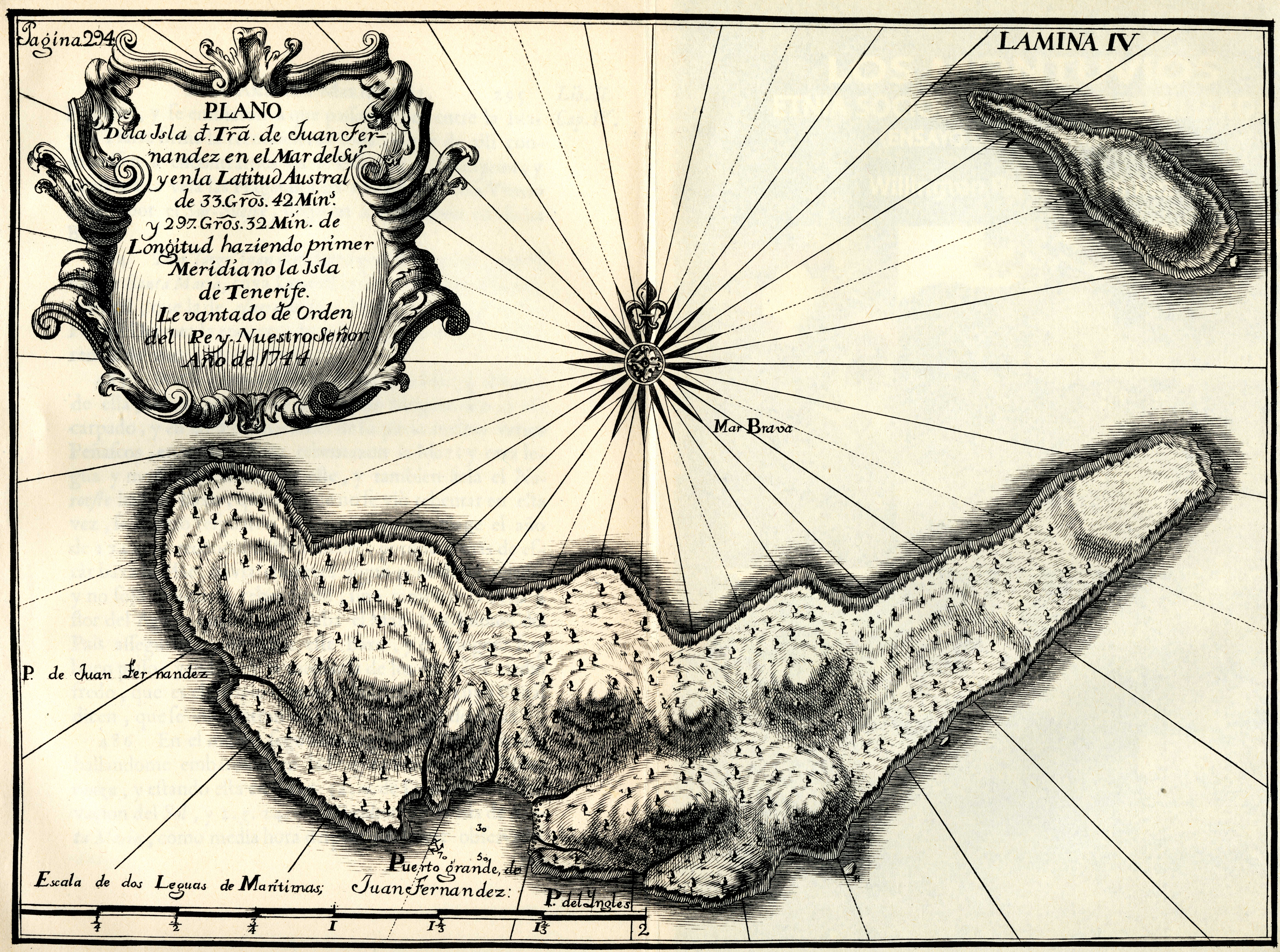 De Ulloa, Antonio y Jorge Juan. Relación Histórica del Viaje a la América Meridional, hecho de Orden de Su Majestad Católica para medir algunos Grados de Meridiano Terrestre, y venir por ellos en conocimiento de la verdadera Figura y Magnitud de la Tierra, con otras varias Observaciones Astronómicas y Físicas. Por Don Jorge Juan Comendador de Aliaga, en la Orden de San Juan, Socio correspondiente de la Real Academia de las Ciencias de París y Don Antonio de Ulloa de la Real Sociedad de Londres: ambos Capitanes de Fragata de la Real Armada. Segunda Parte / Tomo II. Impresa por la Orden del Rey Nuestro Señor en Madrid por Antonio Marín, Año de MCDDXLVIII (1748). Diapositiva de Consulta y acceso publico cuya información fue investigada de un libro y/o ejemplar de revisión custodiado en los Fondos Bibliográficos (Sección Siglo XVIII o Etapa Colonial) del Archivo Histórico del Guayas; Guayaquil, Ecuador